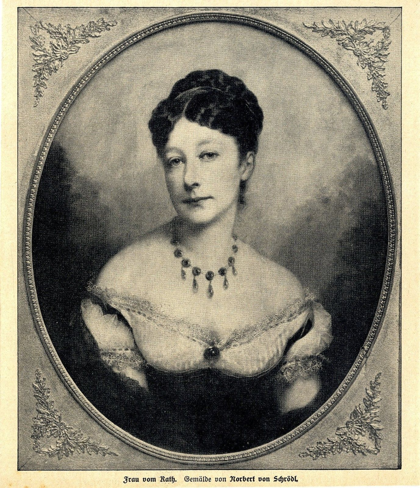 Frau vom Rath. Gemälde von Norbert von Schrödl. Besitzer Adolph vom Rath [1]